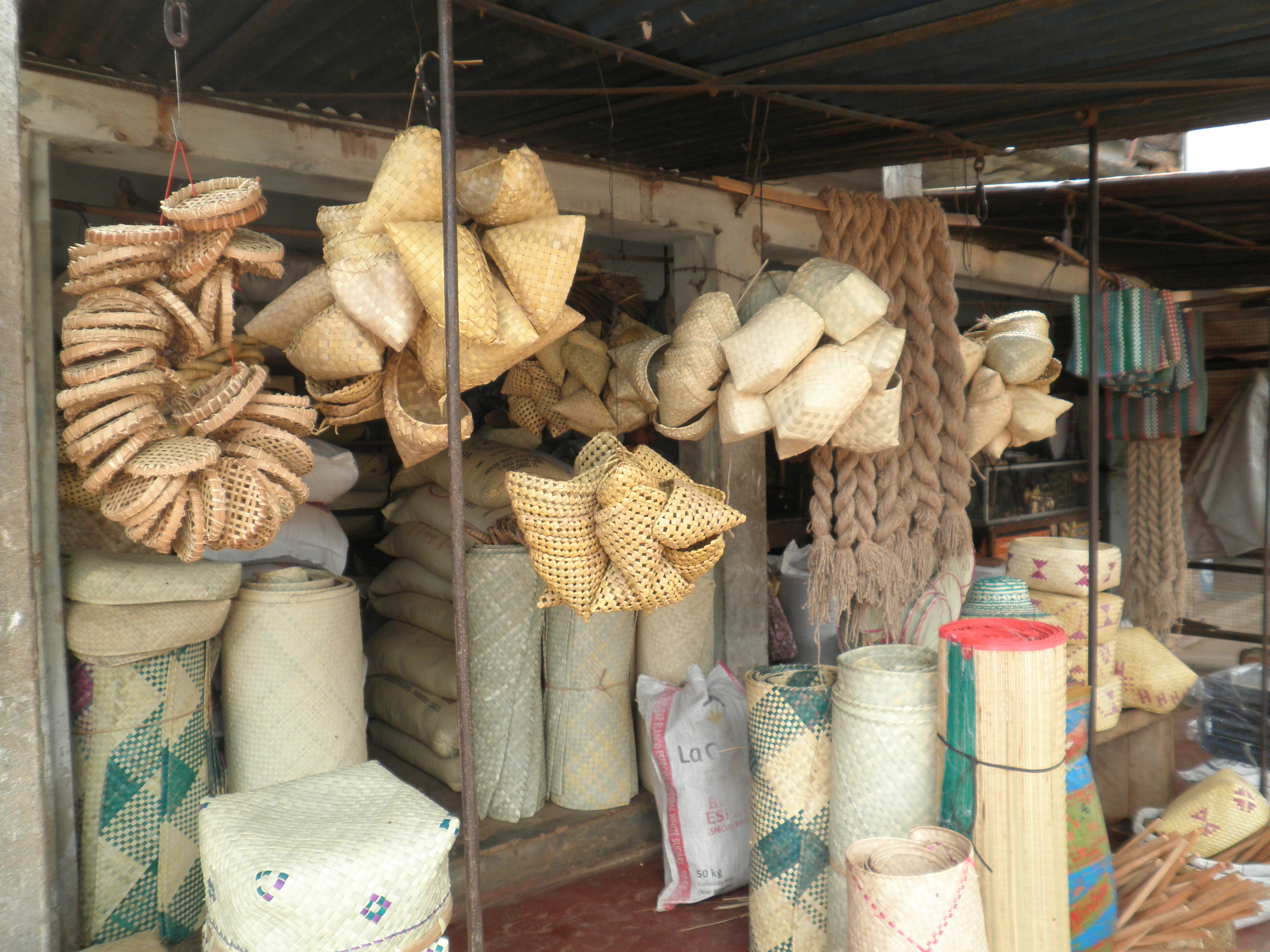 யாழ்ப்பாணப் பகுதியில் உள்ள பனம் பொருள் உற்பத்திகள் விற்கும் கடையில் பல்வேறு வகையான பனையோலைப் பொருட்கள் விற்பனைக்கு வைக்கப்பட்டுள்ளன.